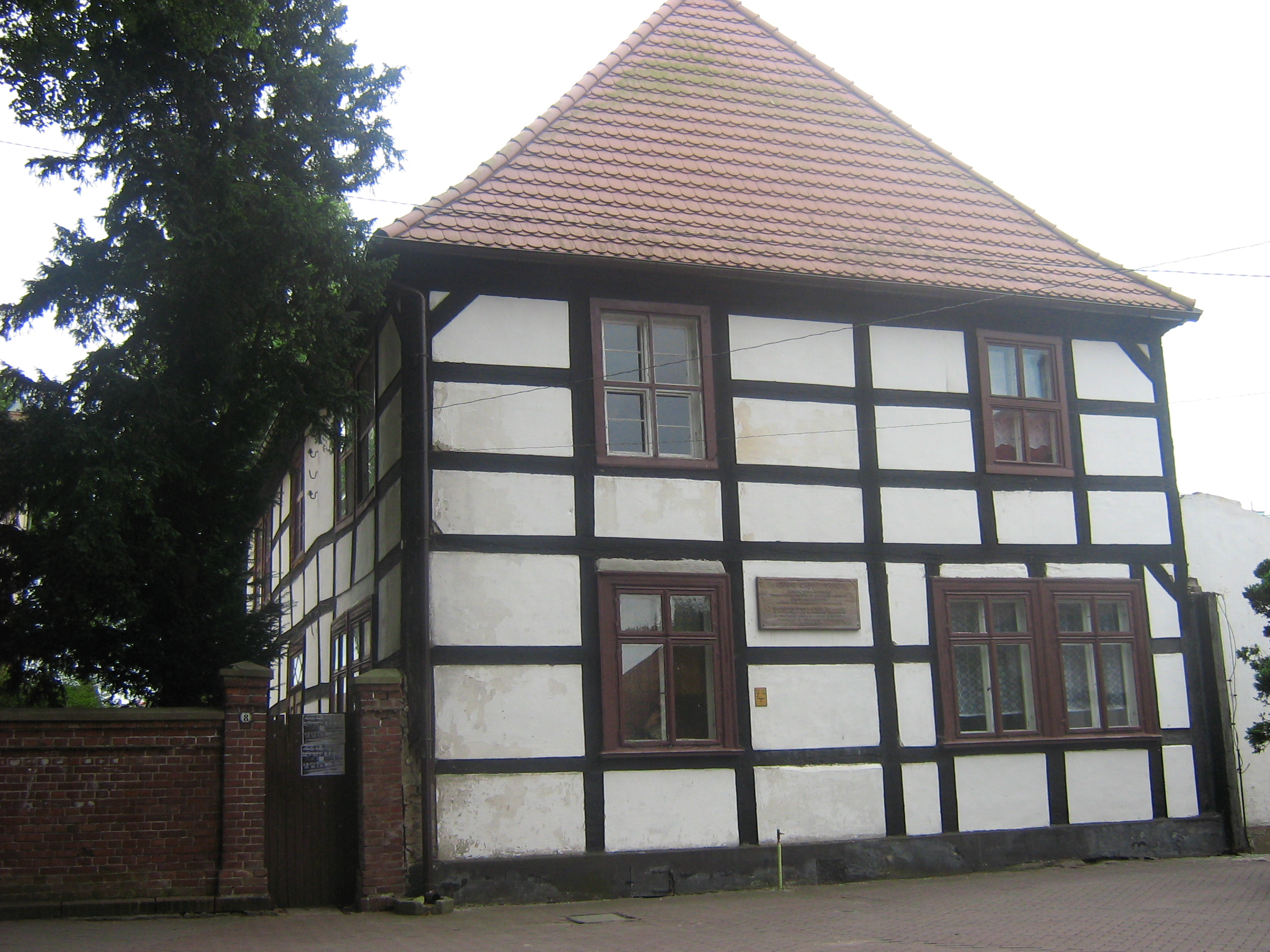 Dawna plebania w Kamieniu Pomorskim (obecnie dom sióstr zakonnych). W tym domu mieszkał podczas swych wielokrotnych pobytów w Kamieniu w latach 1962-1973 prof. Gwido Chmarzyński. Postać Profesora upamiętnia odsłonięta w 1985 r. tablica, która głosi: GWIDO CHMARZYŃSKI HISTORYK SZTUKI MUZYKOLOG PROFESOR UNIWERSYTETÓW W POZNANIU I TORUNIU WYBITNY ZNAWCA SZTUKI POLSKICH ZIEM ZACHODNICH I PÓŁNOCNYCH URODZONY 20-VII-1906 R. W NAKLE NAD NOTECIĄ W LATACH 1962 - 1973 W KAMIENIU POMORSKIM W TYM DOMU MIESZKAŁ I ZMARŁ 30-VII-1973 R. POCHOWANY NA CMENTARZU JUNIKOWSKIM W POZNANIU